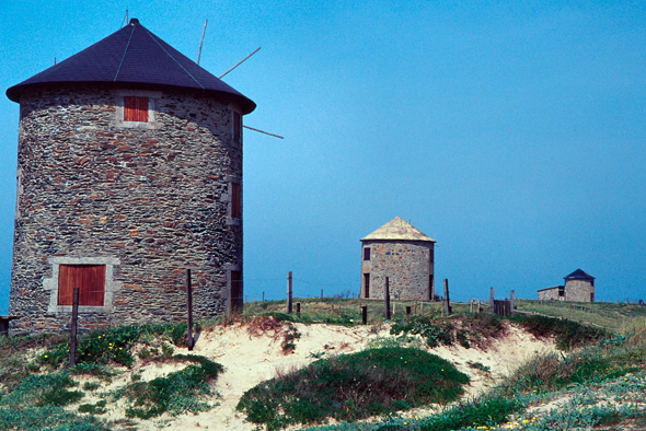 Windmills in Apúlia, Esposende